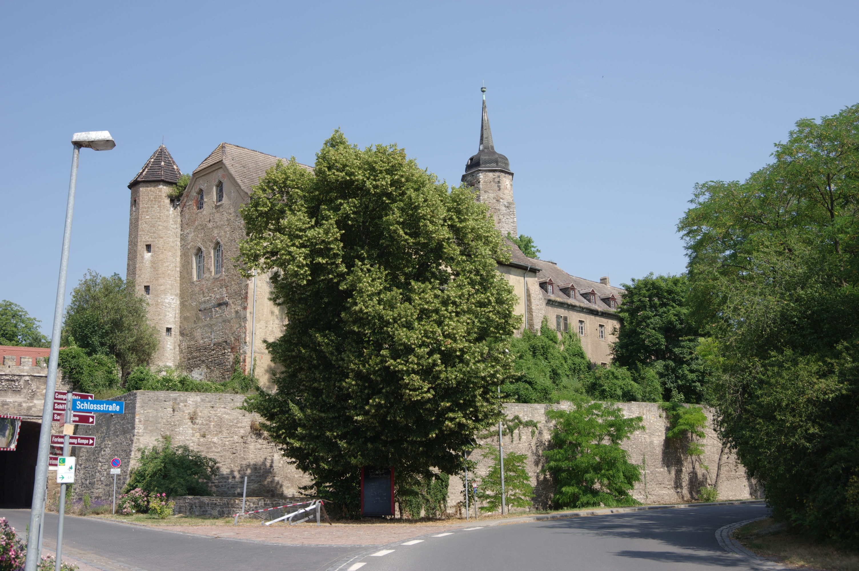 Seegebiet Mansfelder Land, Ortsteil Seeburg. Das Schloss Seeburg steht unter Denkmalschutz.